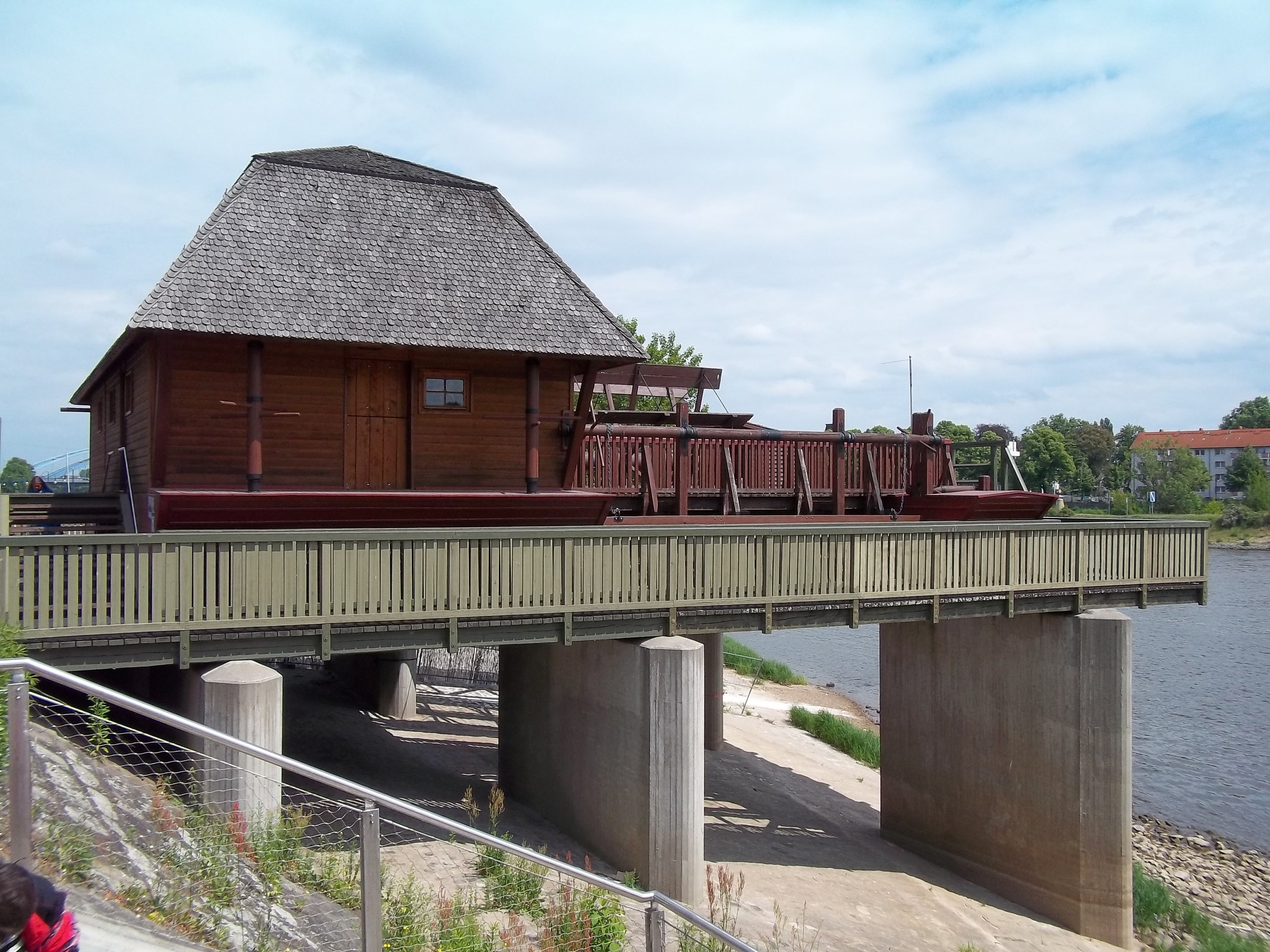 Dies ist eine Ansicht der Schiffsmühle am Petriförder in Magdeburg. Dieser original getreue und funktionierende Nachbau der Schiffsmühlen in Magdeburg. Sie fungiert als Museum und ist somit für jedermann zu besichtigen.